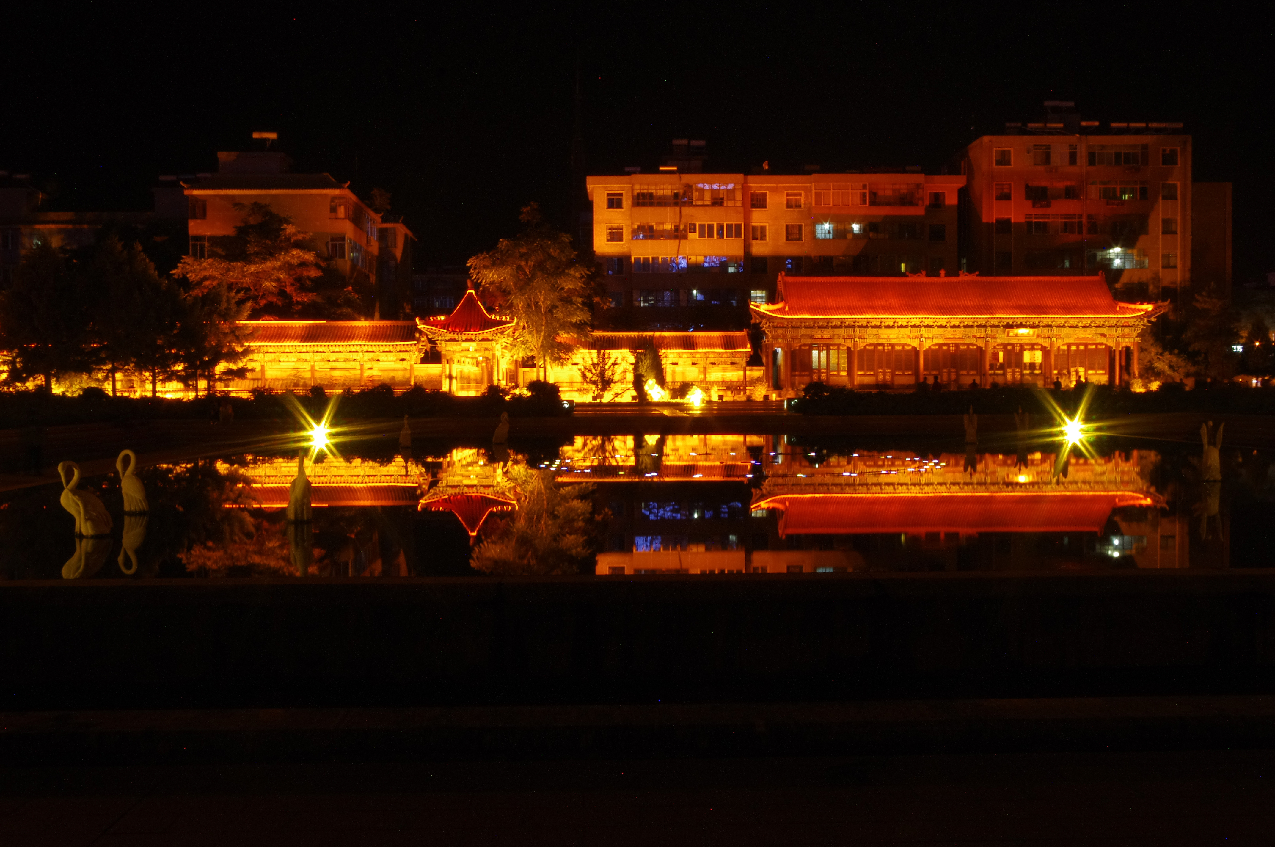 The making of this document was supported by Wikimedia Polska. To zdjęcie zostało wykonane podczas Wikiwyprawy 2015.Wszystkie zdjęcia z wyprawy możesz zobaczyć w kategorii: Wikiwyprawa 2015. English | polski | +/− To zdjęcie zostało załadowane dzięki współpracy z firmą Hyperbook. polski | +/− To zdjęcie zostało załadowane dzięki współpracy z firmą: Kopex Group. English | polski | +/−